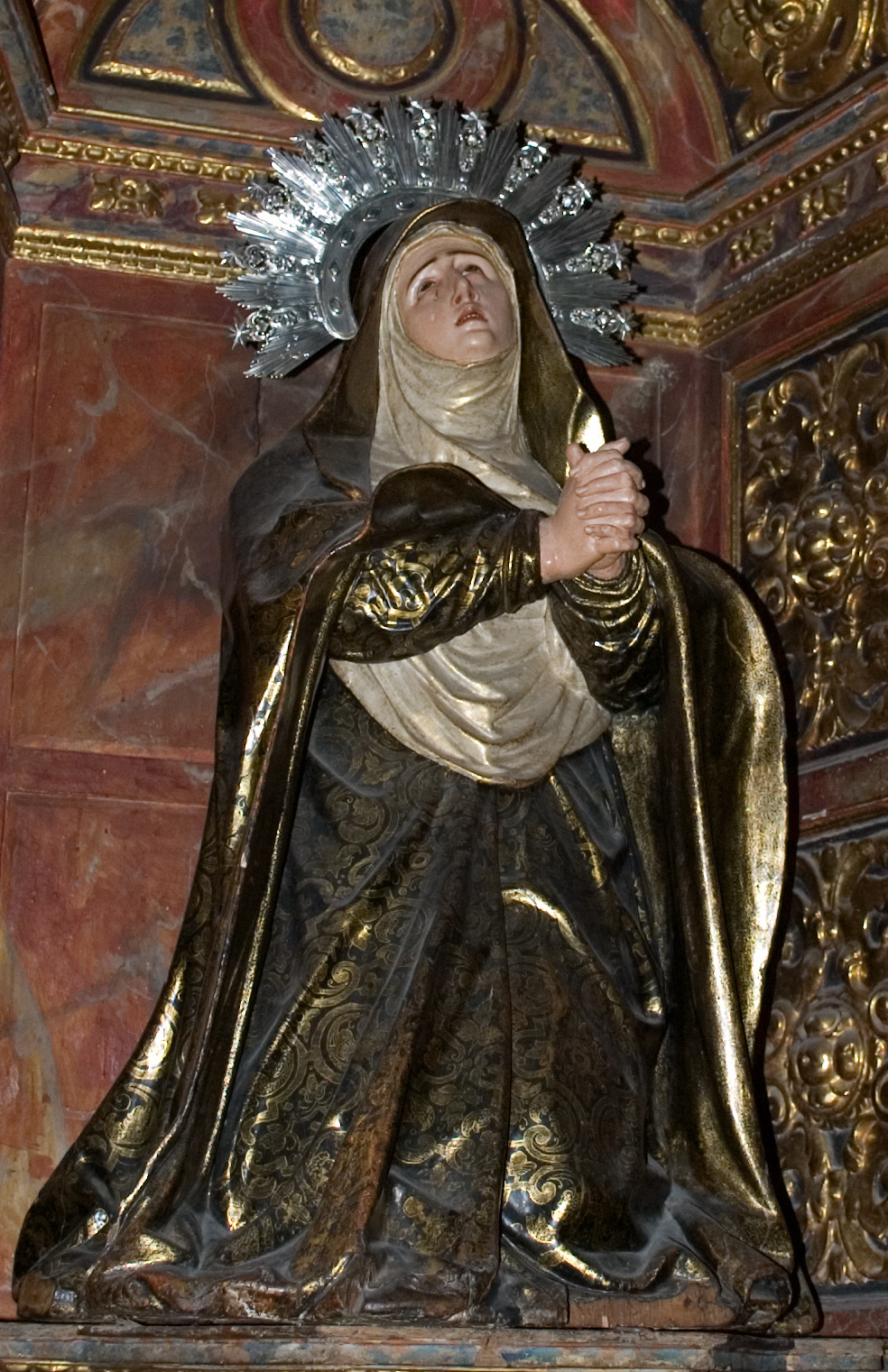 Imagen de la Virgen de la Antigua (1650-1651), iglesia de Santa María Magdalena, Sevilla autor: Pedro Roldán